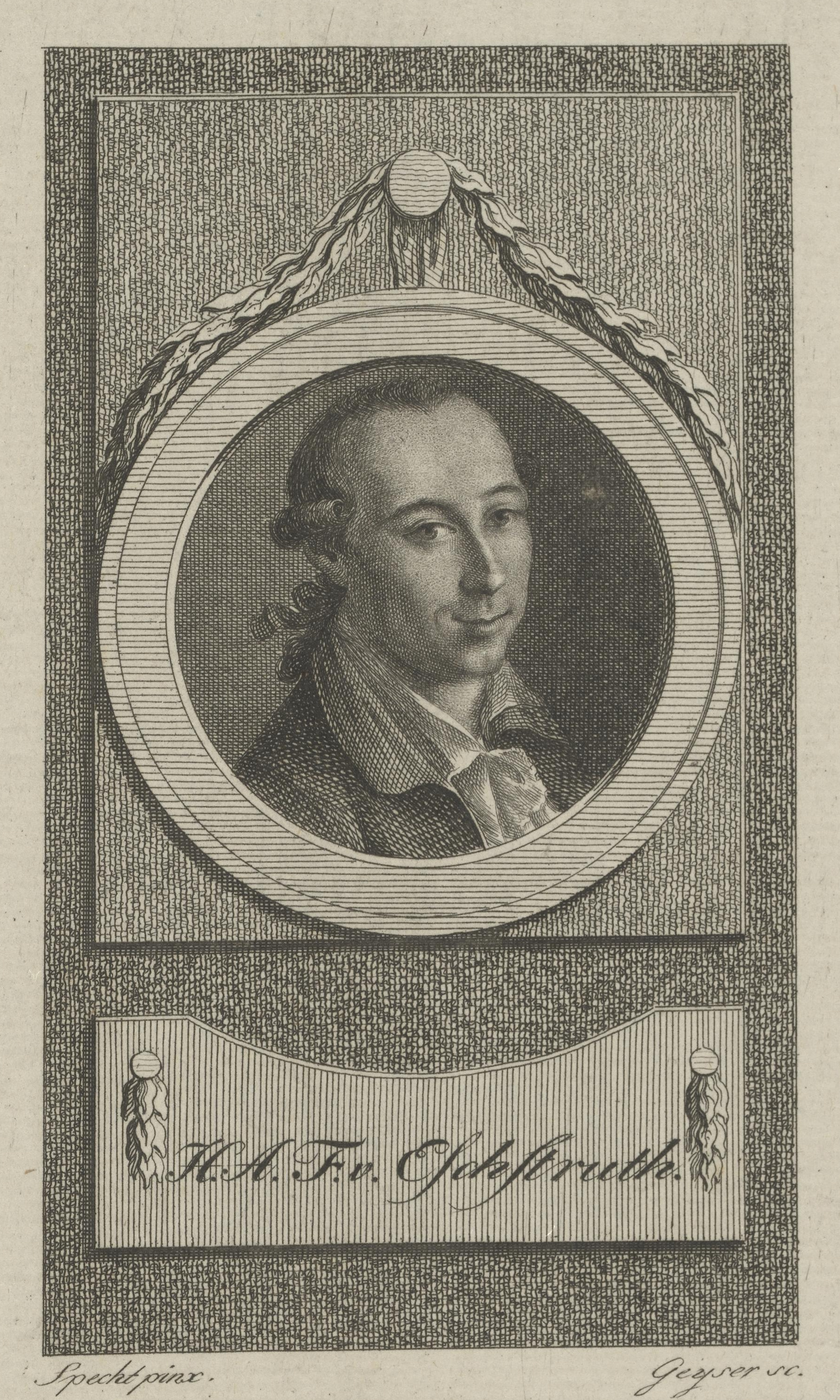 Depicted person: Hans Adolph Friedrich von Eschstruth